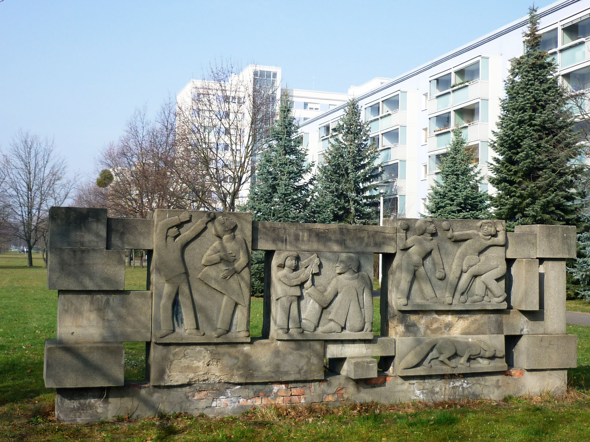 Relief in der Striesener Str. in Dresden-Johannstadt